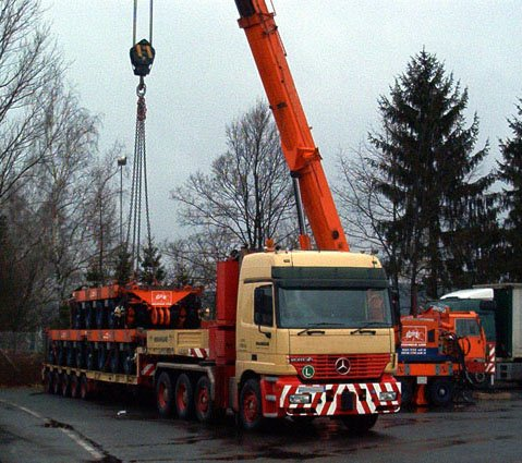 Verladen eines Schwertransporters (SPMT - self propelled modular transporters der Firma BAUMANN) auf einen Tieflader